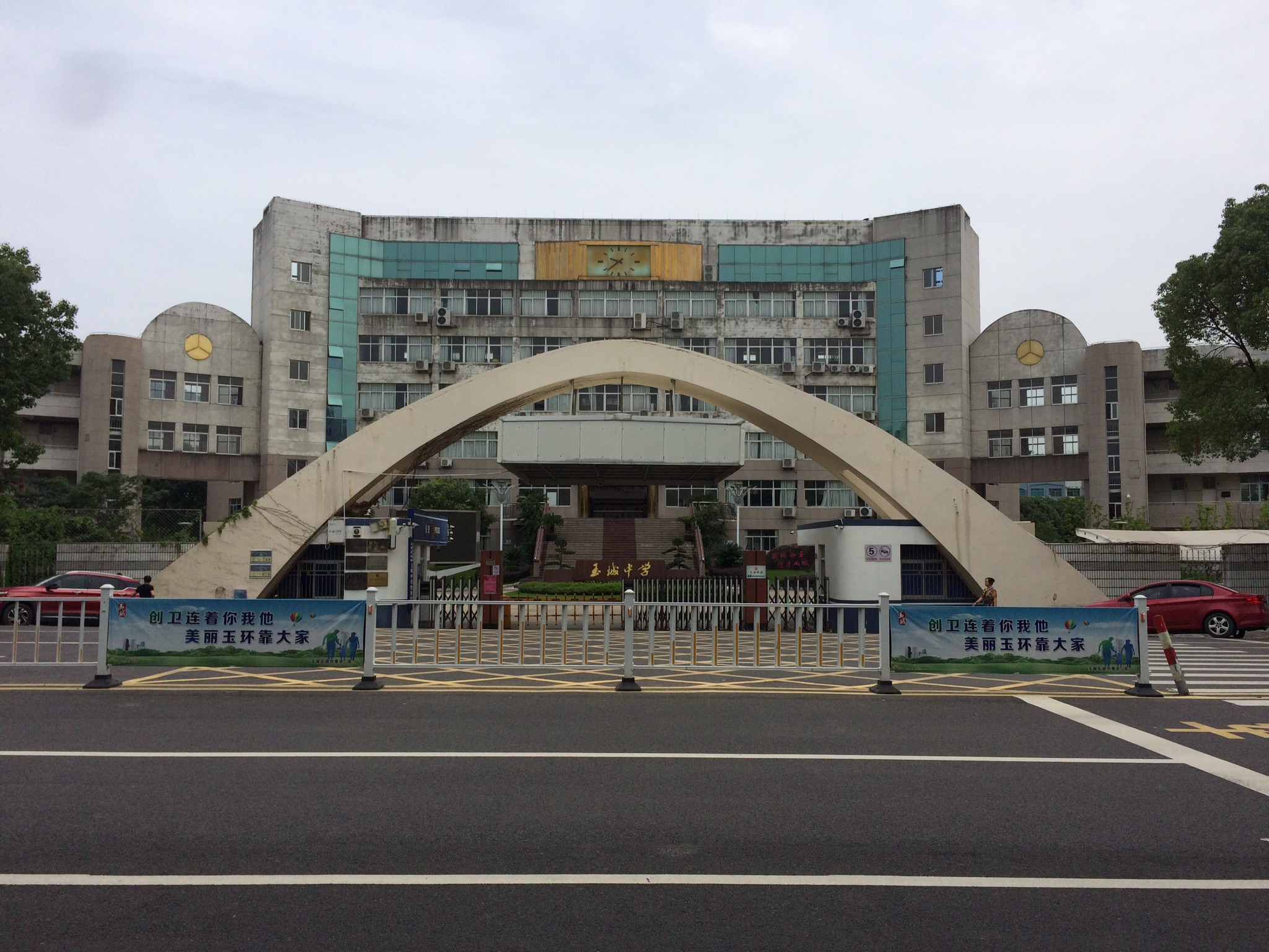 中文（中国大陆）: 玉环市玉城中学